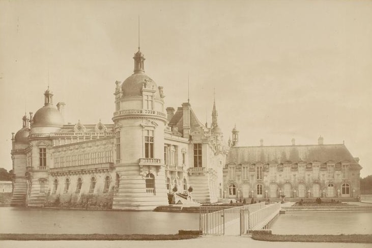 Chantilly : le château neuf vu depuis les parterres. Photographie de la seconde moitié du XIXe siècle.